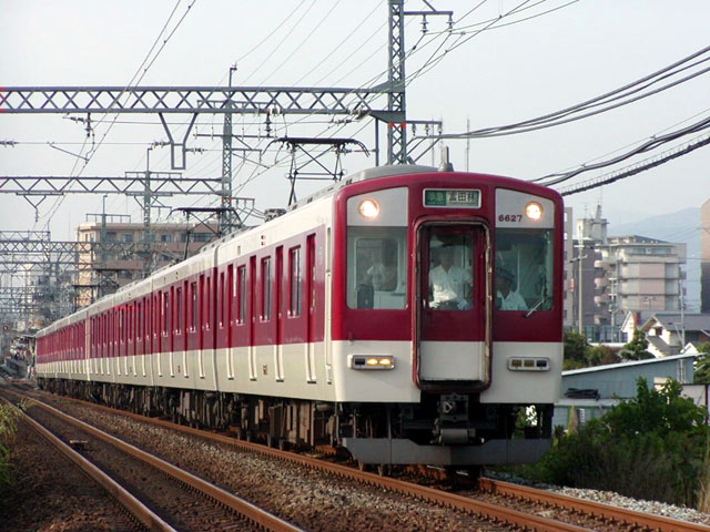 近鉄 6620系